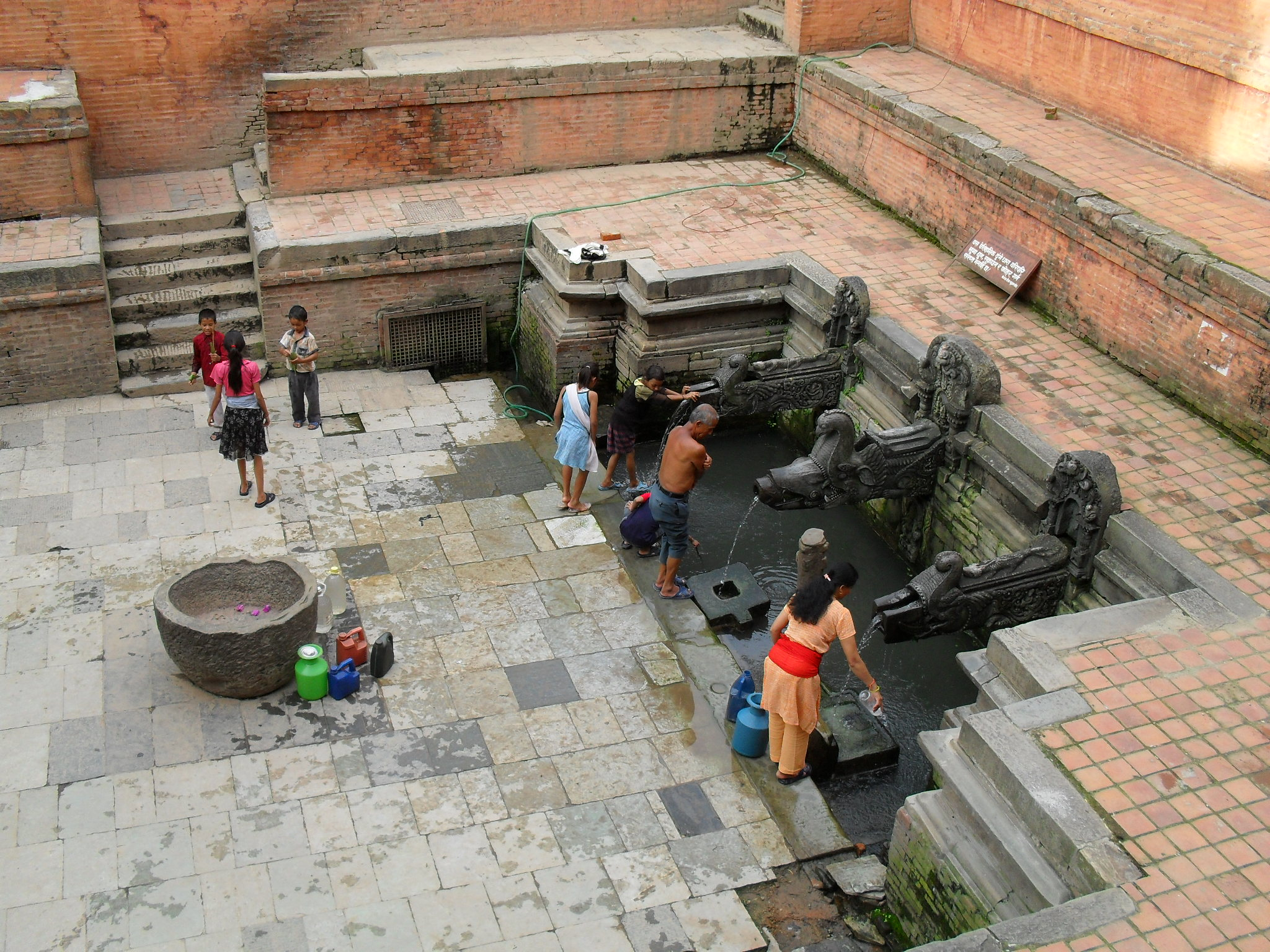 Patan Kathmandu